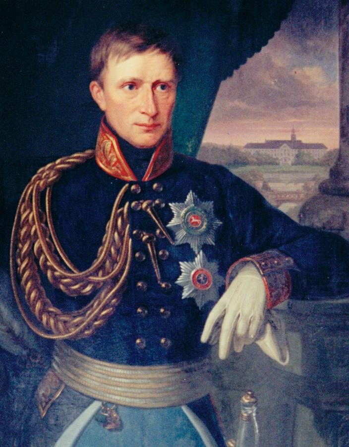 Johann Friedrich von der Decken (1769-1840), Ausschnitt vom Foto eines Ölbildes (Porträt gemalt nach 1815 mit Ergänzung von Schloß Ringelheim im Hintergrund nach 1817)